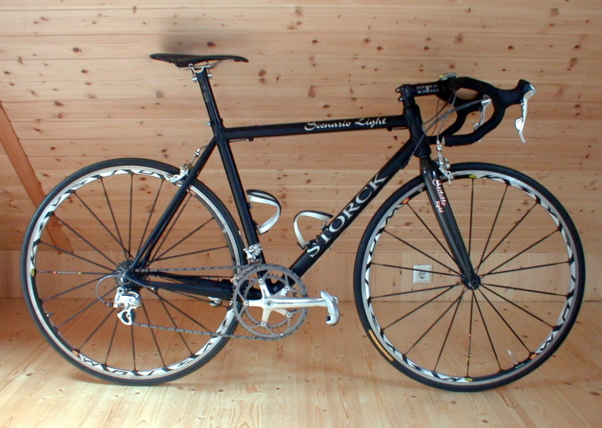 Ein Storck-Rennrad mit Aluminiumrahmen, Typ Scenario light, mit Mavic Ksyrium SL SSC 2004 (Laufräder), Tune-Sattelstütze, Storck-Vorbau, Storck Stiletto light (Gabel) und Dura-Ace-Gruppe von Shimano.